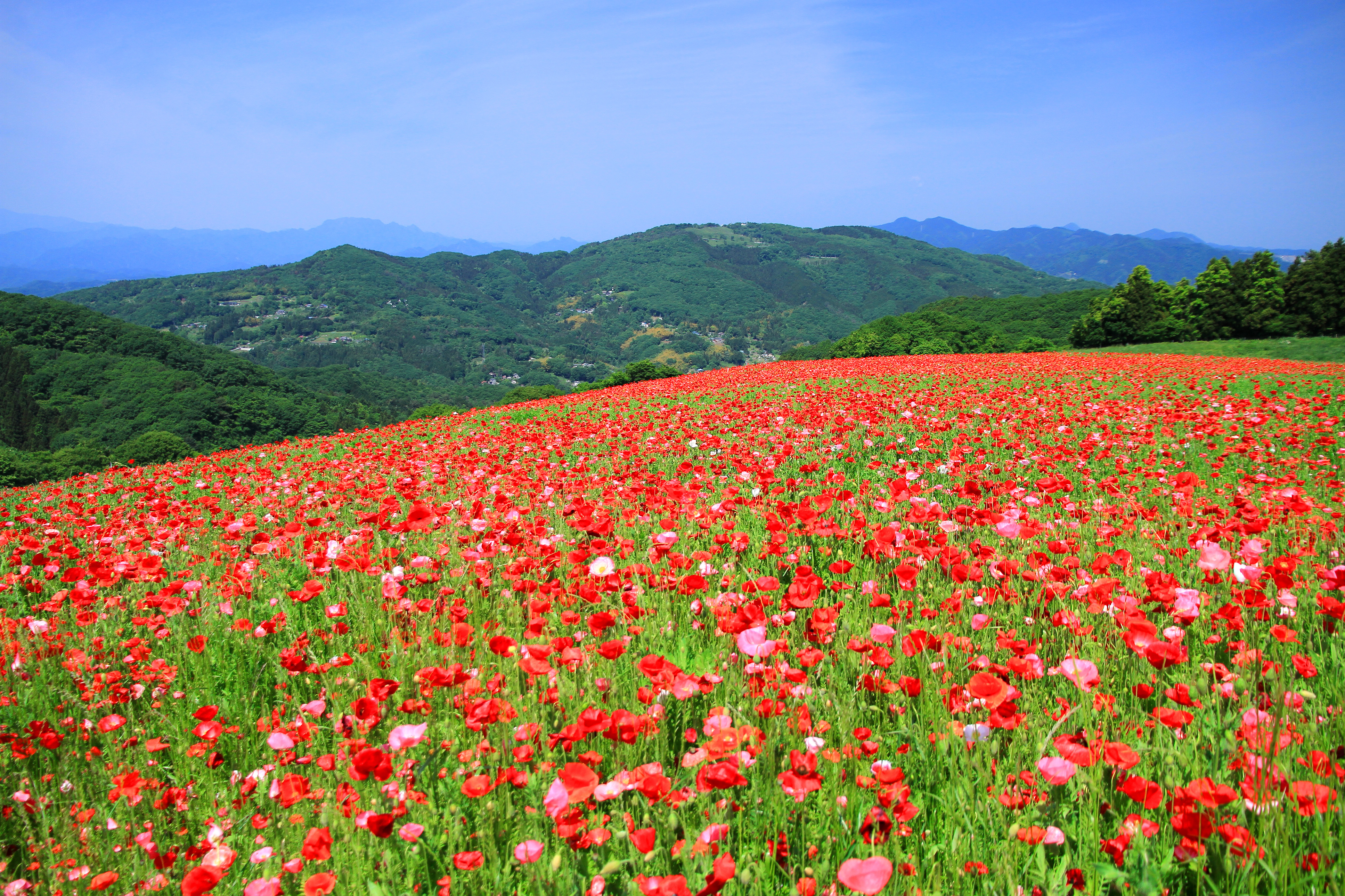 秩父高原牧場のシャーレーポピーと蓑山（埼玉県秩父郡皆野町）